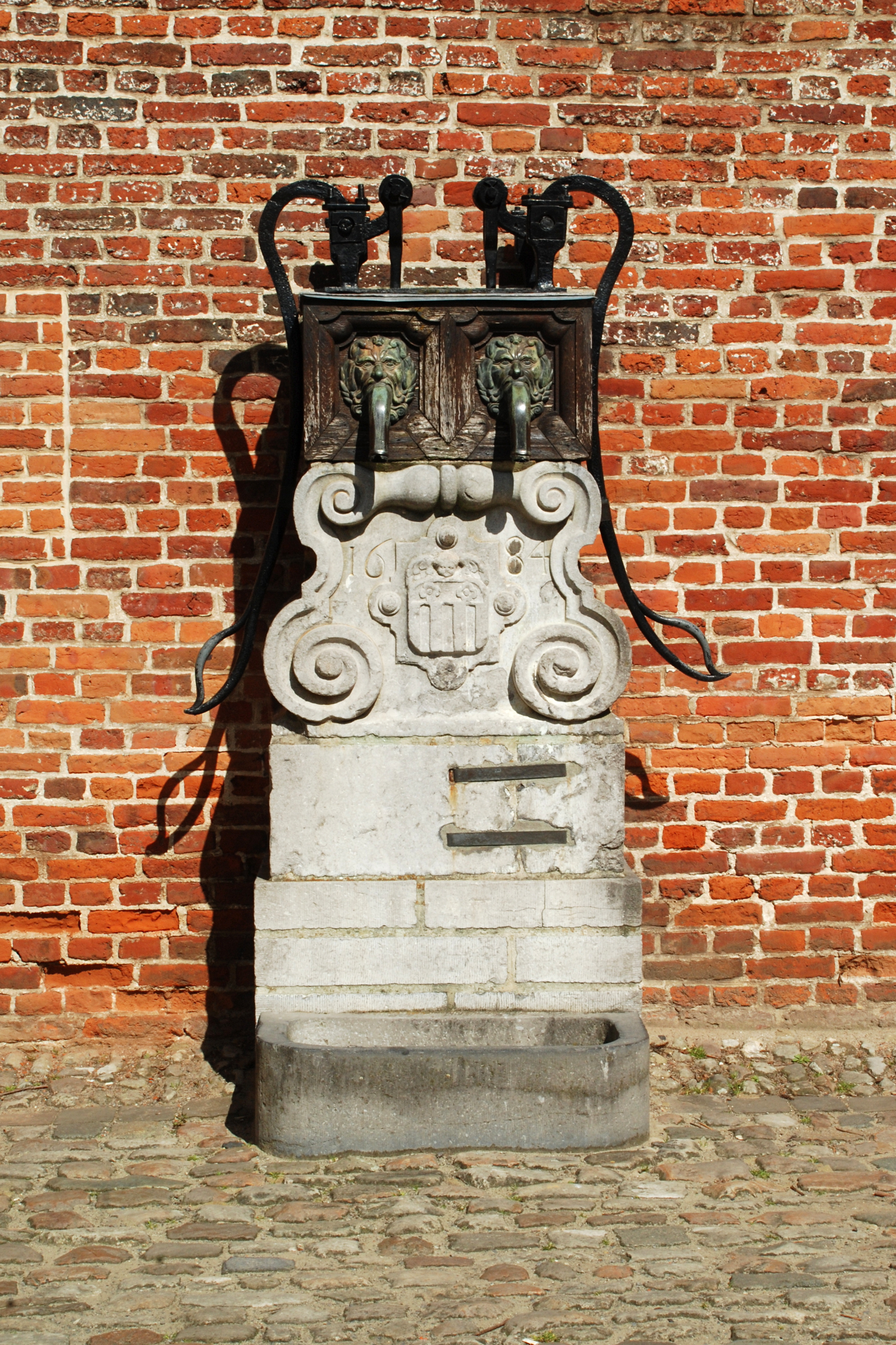 Belgium - Leuven - Groot Begijnhof - Convent van Lommel - Benedenstraat 41